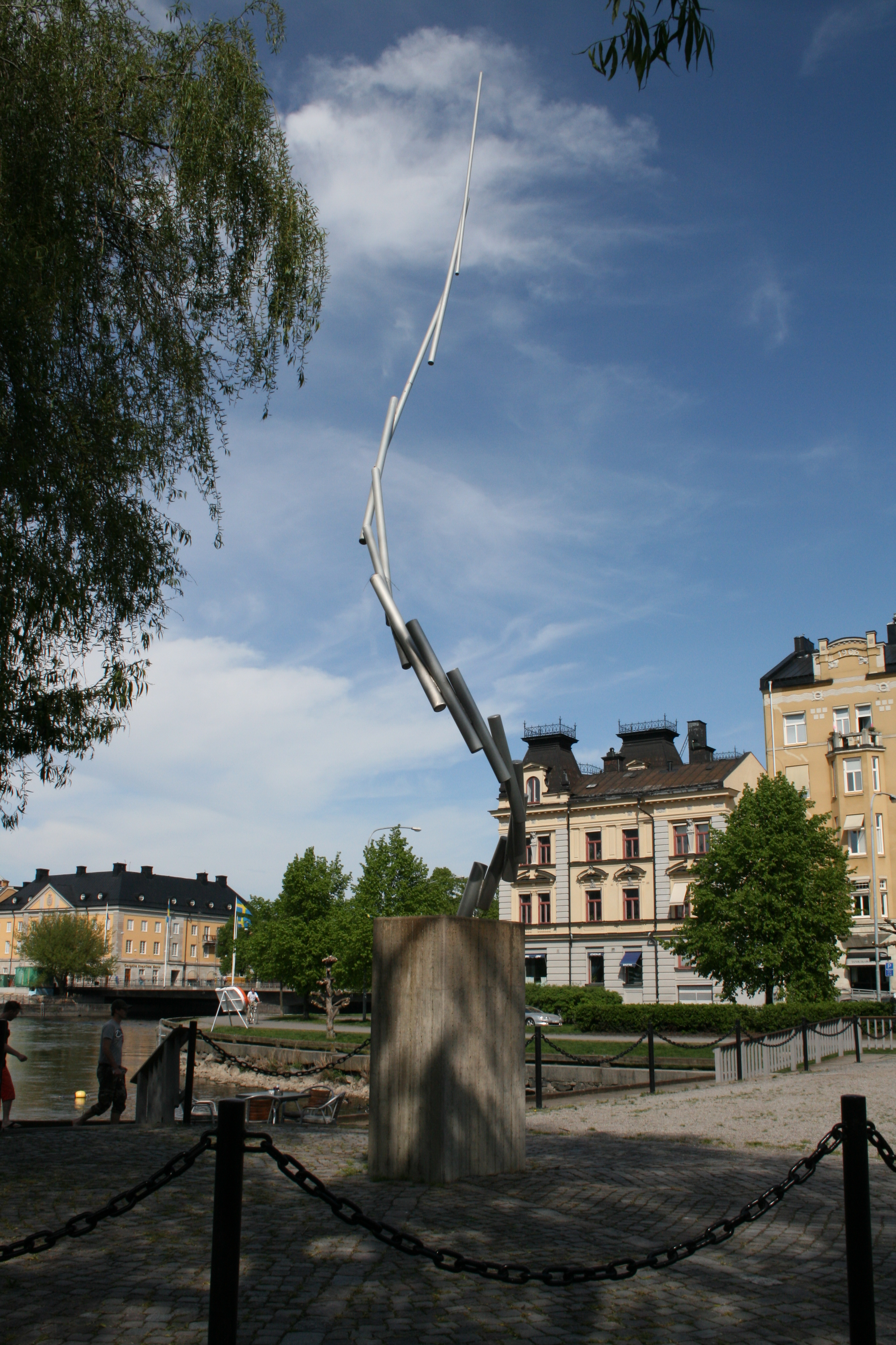 Roterande acceleration, konstverk i Strömparken i Norrköping